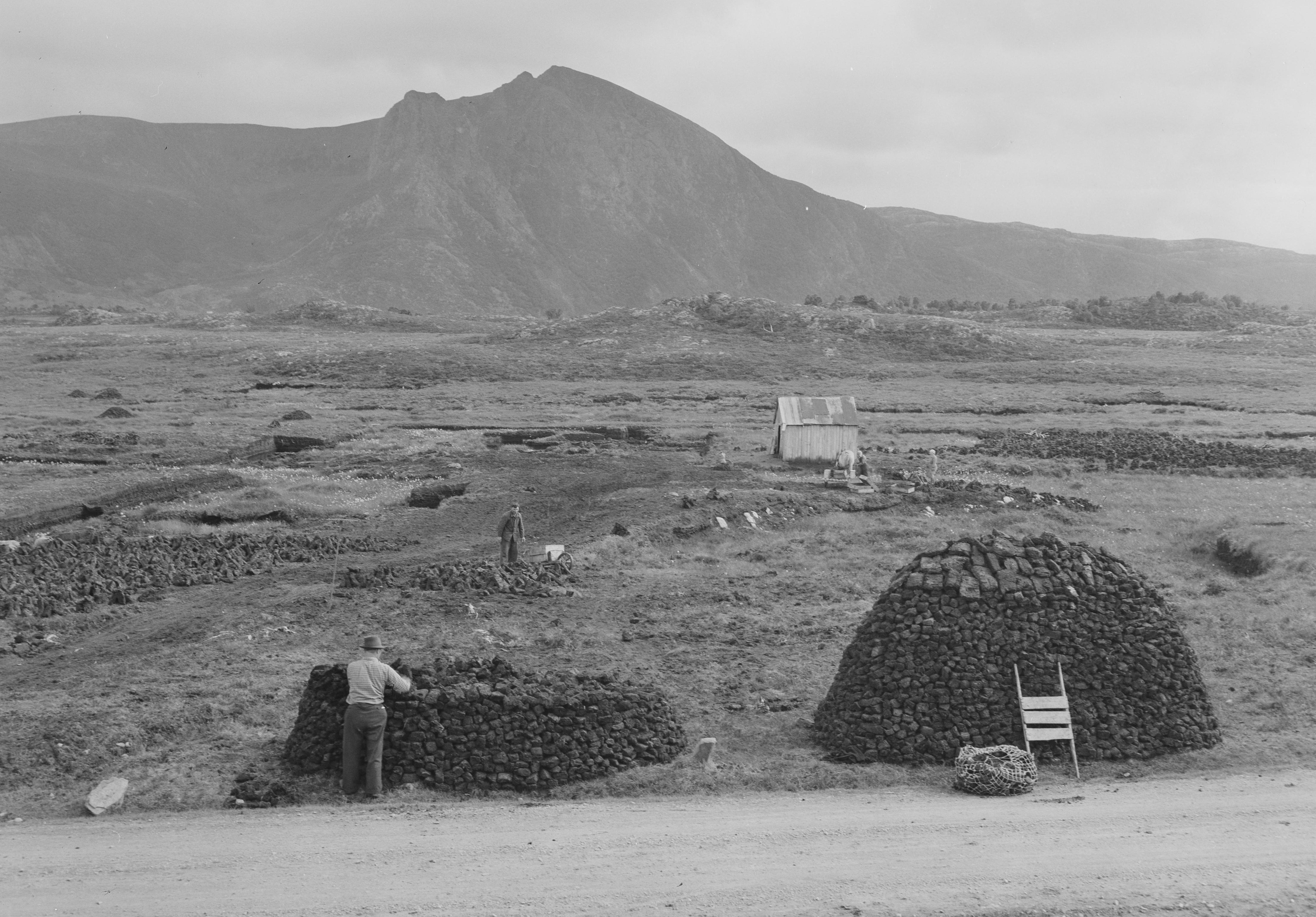 Bildet er hentet fra Nasjonalbibliotekets bildesamling. Anmerkninger til bildet var: fotograf :ukjent Hustad, Fræna, Møre og Romsdal